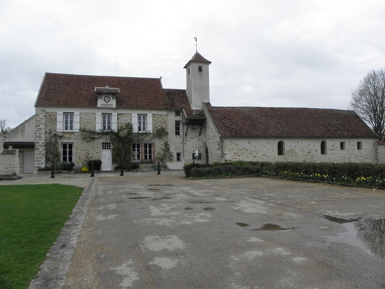 Église et mairie d'Hautefeuille (77).